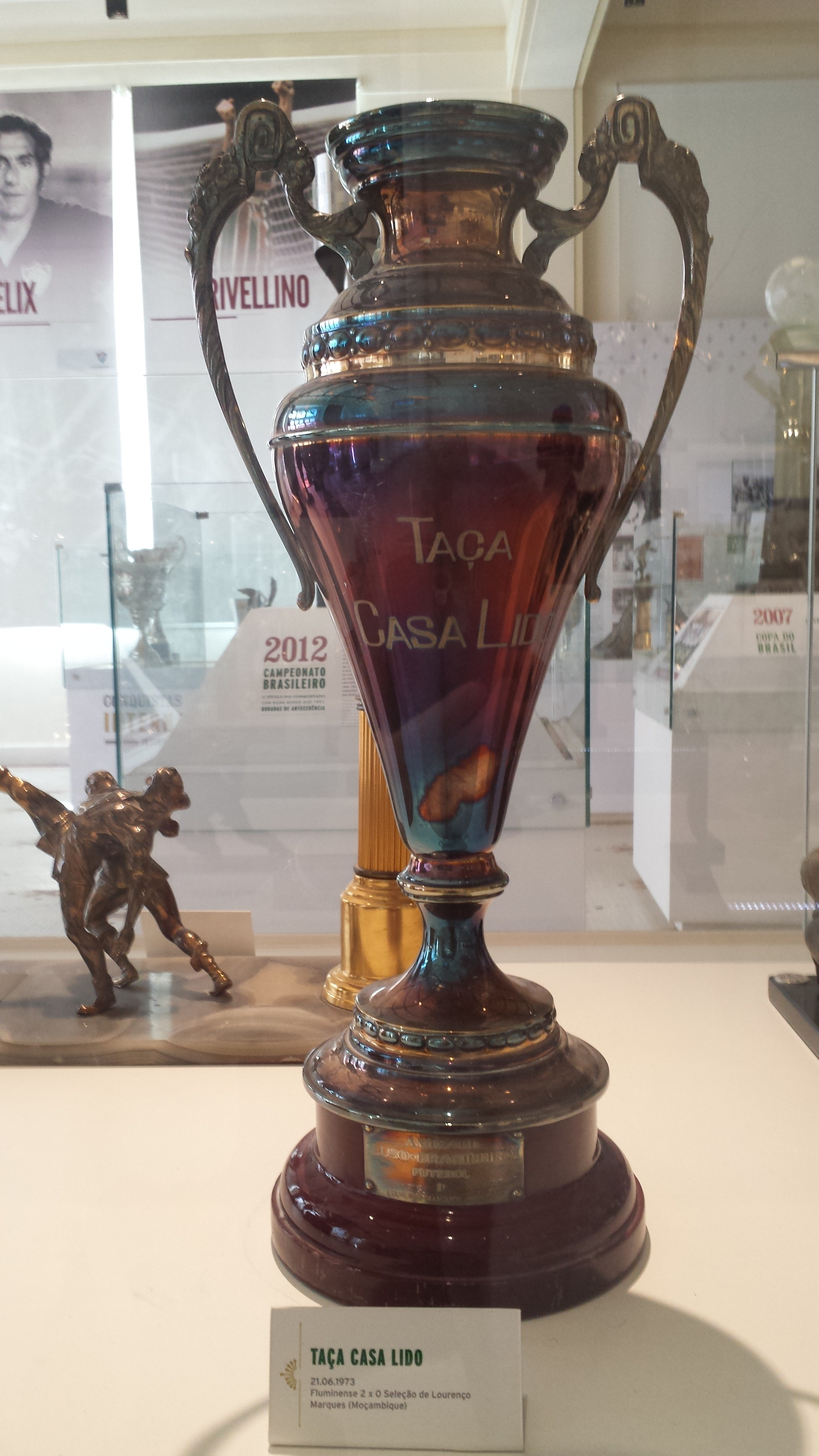 Taça Casa Lido 1973 disputada entre o Fluminense Fotball Club e a Seleção de Lourenço Marques em Moçambique.